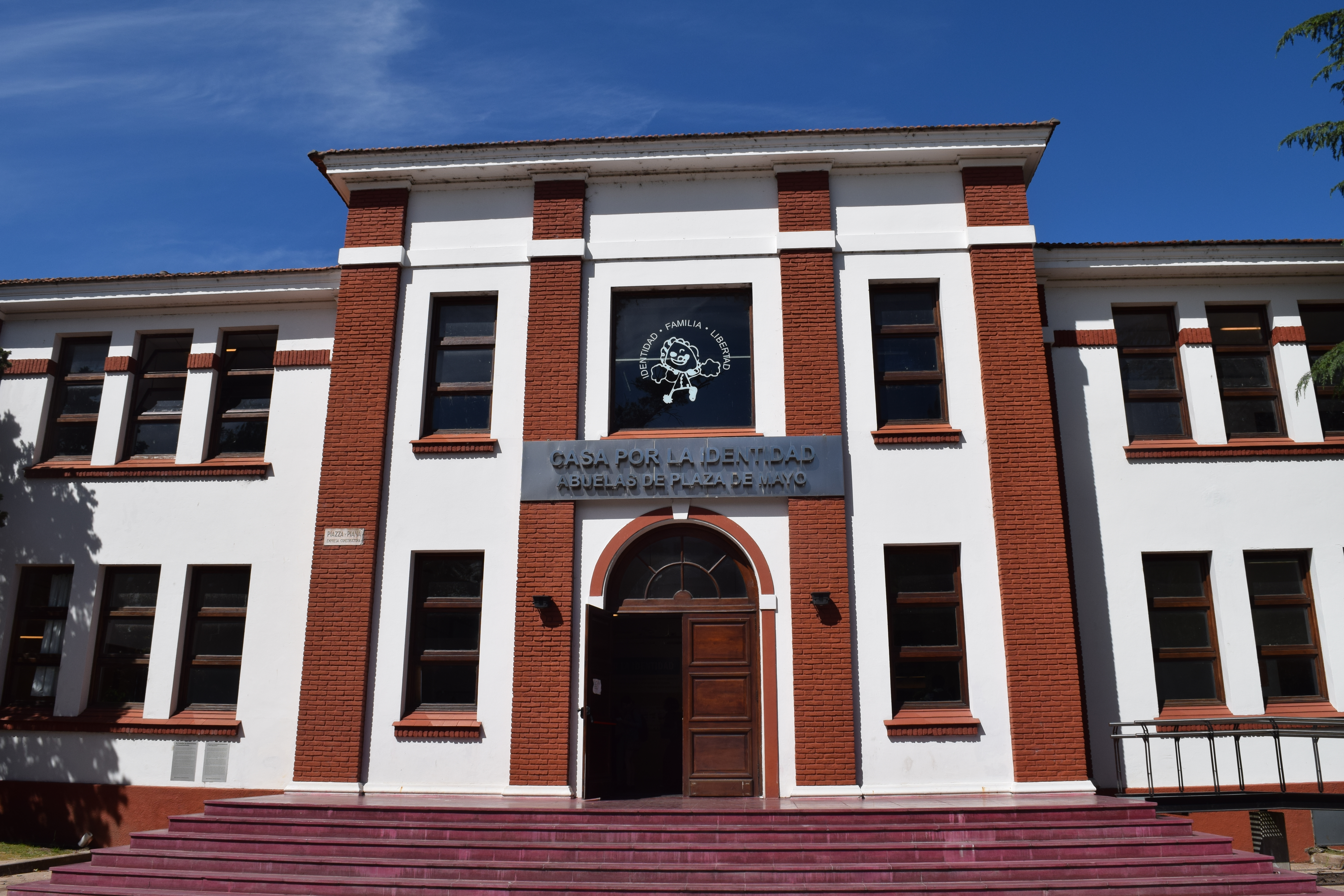 La Casa por la Identidad de las Abuelas de Plaza en el antiguo predio de la Escuela Superior de Mecánica de la Armada (ESMA) en el barrio porteño de Núñez.